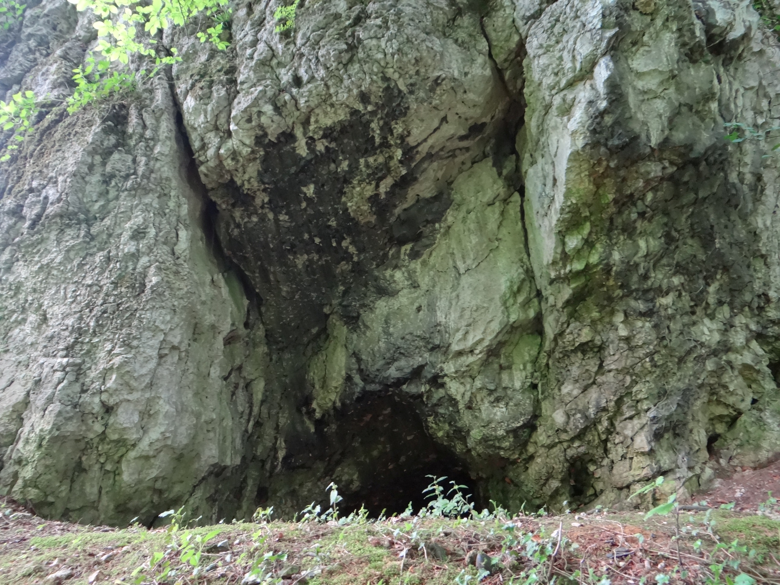 Jaskinia Szklana w Szklarach (w Bukowej Górze). Otwór pn. zach.